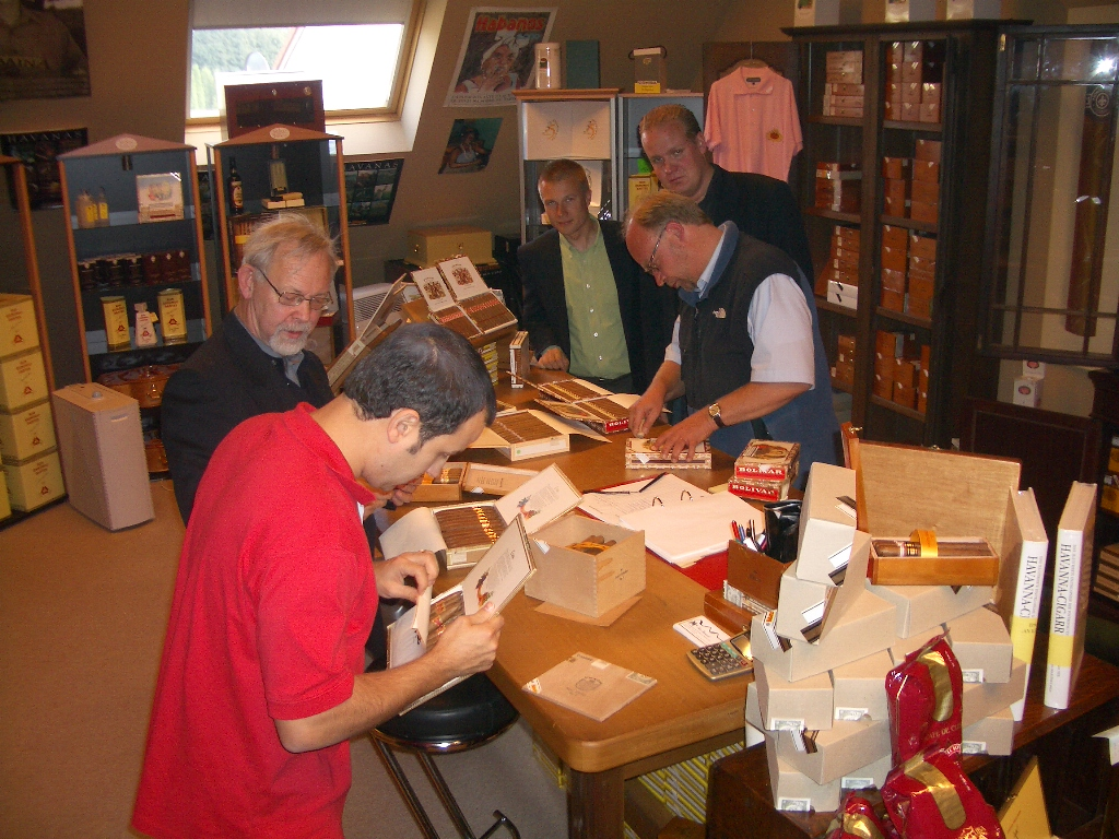 Cigar shopping at La Casa del Habano Köln